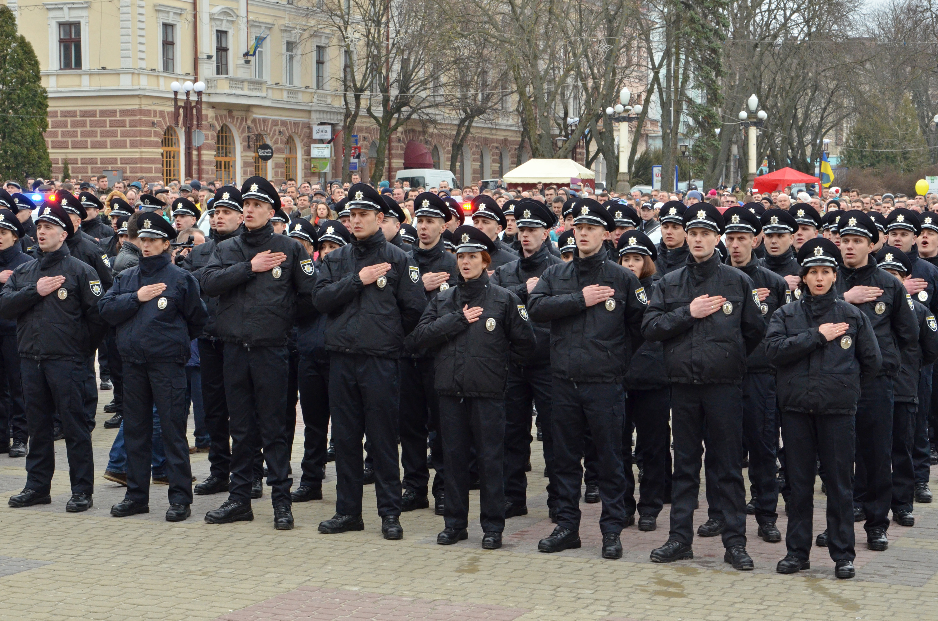 Присяга патрульних поліціянтів Тернополя. Театральний майдан. 12 березня 2016 року.